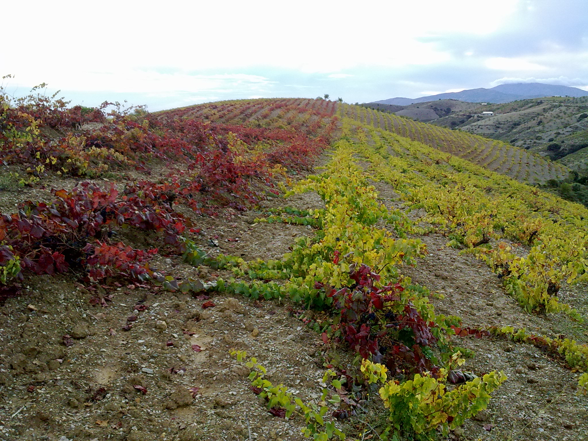 Viñedos cerca de Murtas, en la provincia de Granada (España). Octubre de 2010